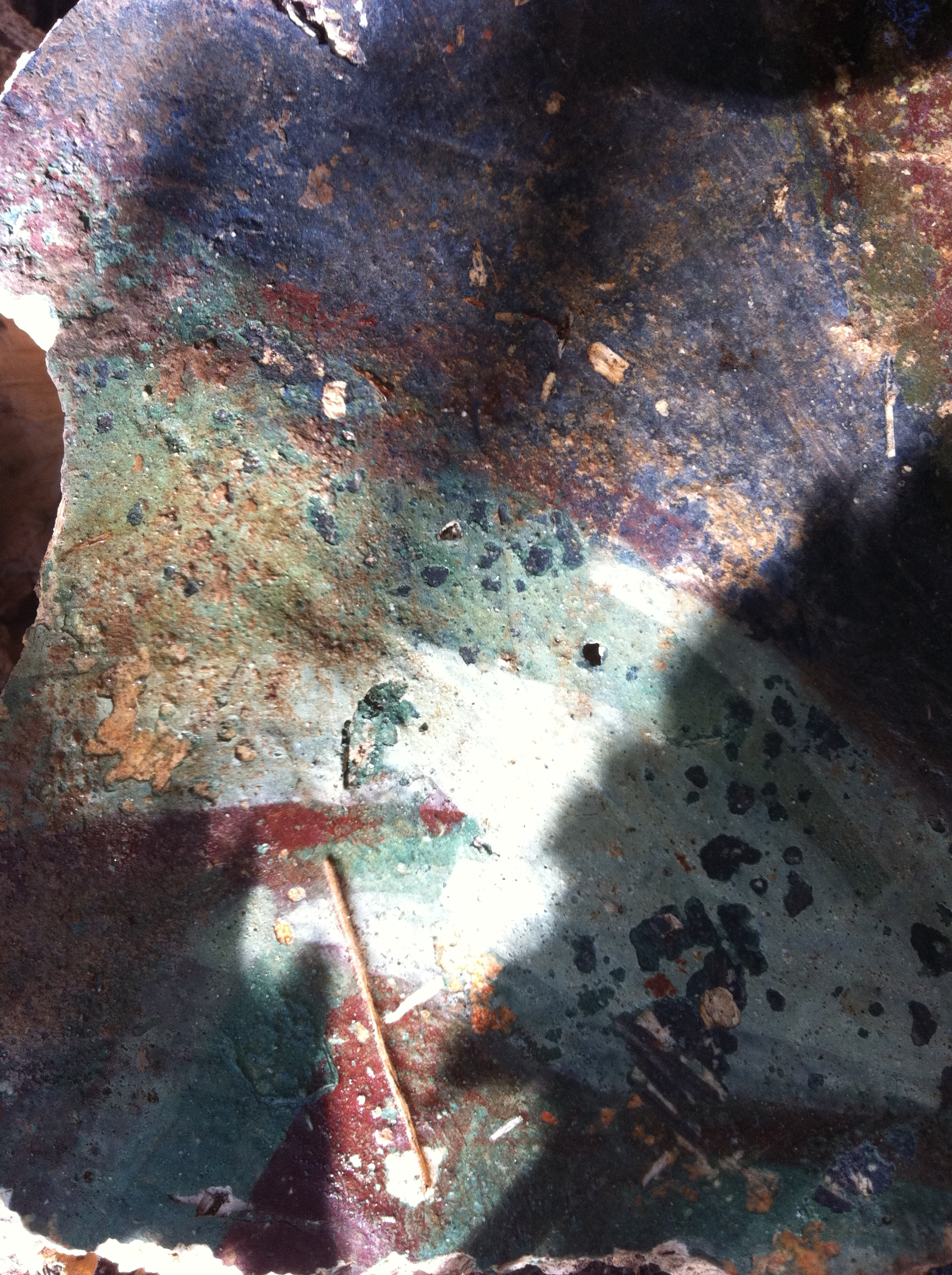 Стенописи от манастира край село Боров дол, община Твърдица, област Сливен